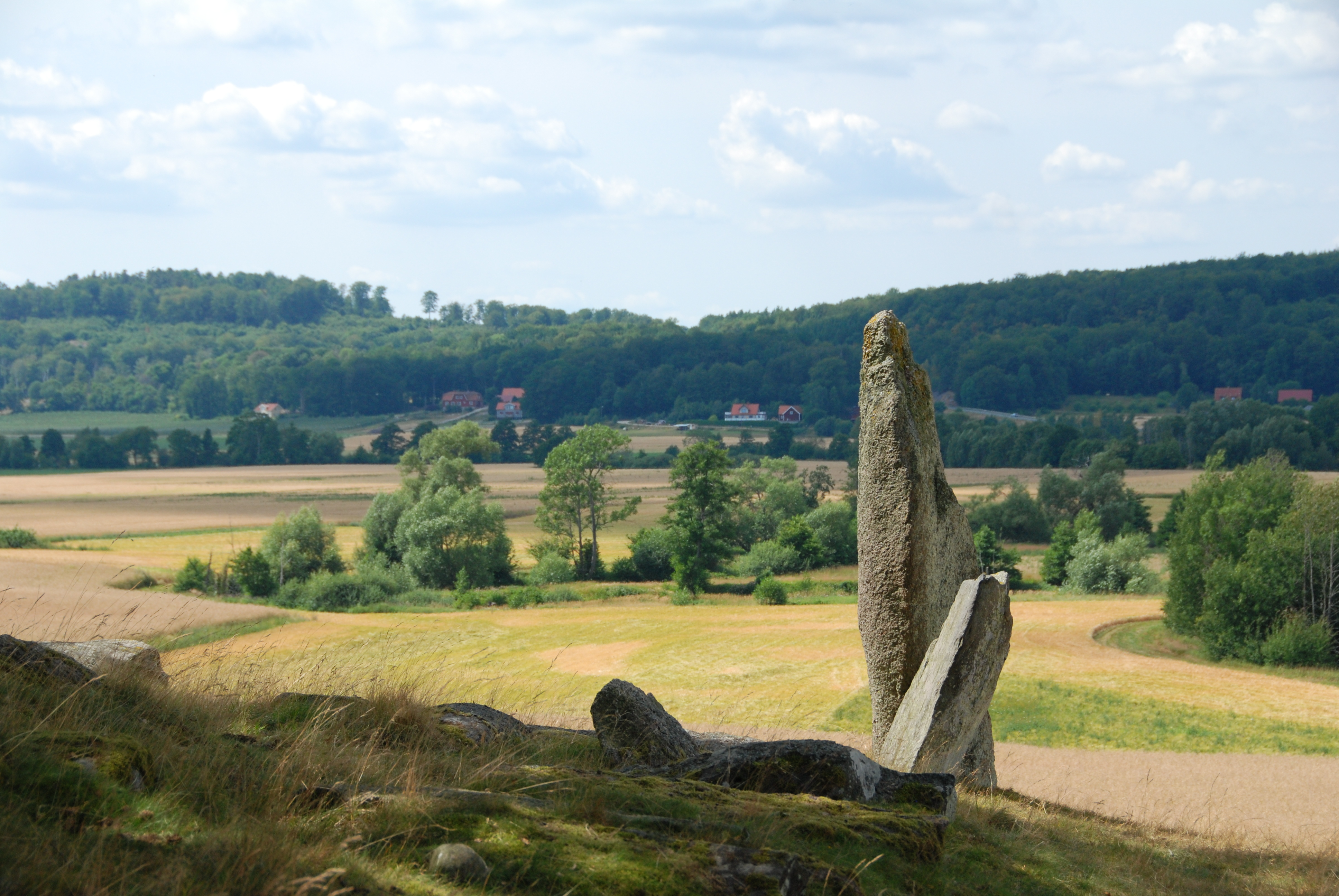 Gamla kyrkogård med Backar (Näsum 5:1)